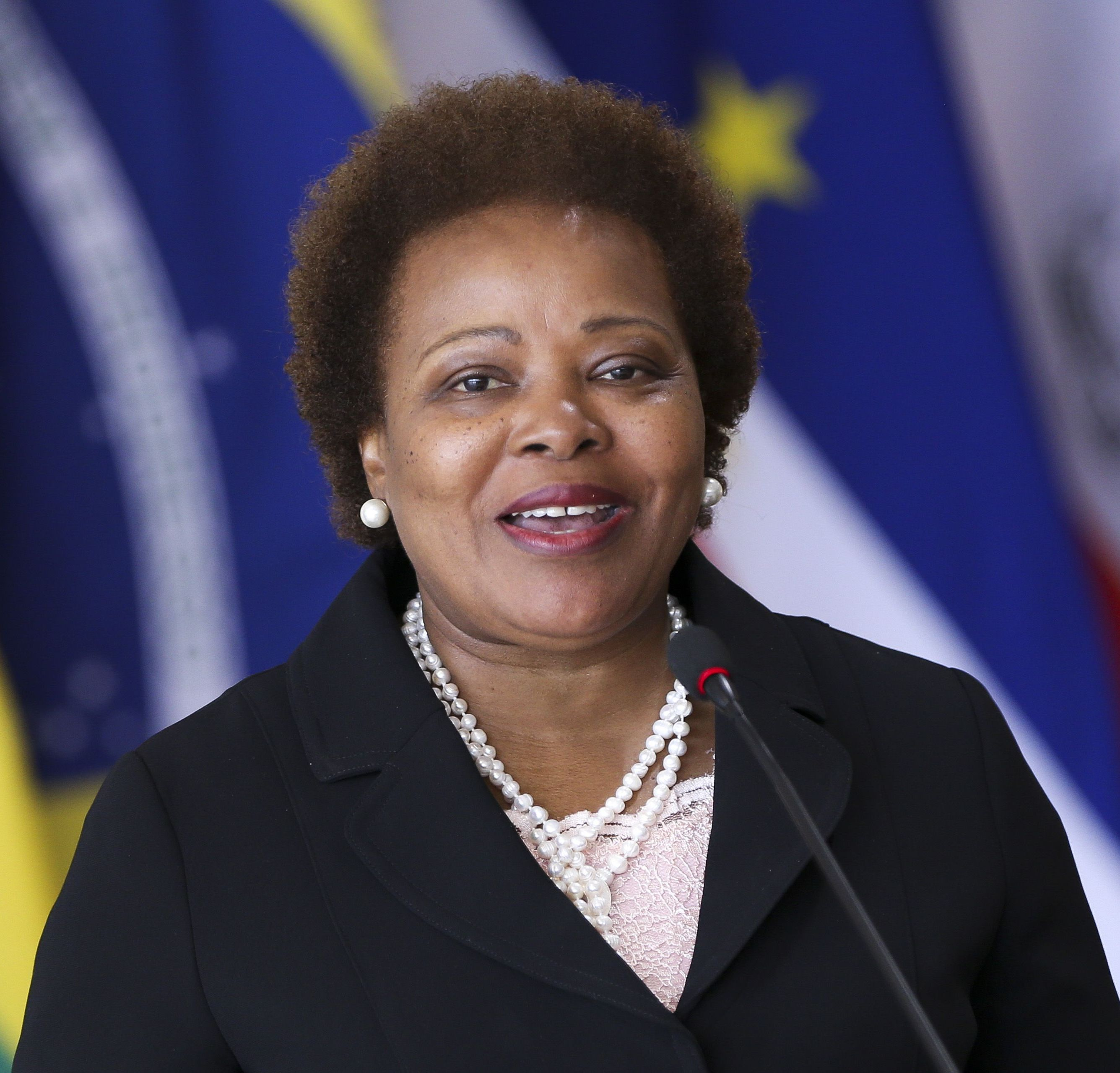 Brasília - A secretária-executiva da CPLP, Maria do Carmo Trovoada, durante cerimônia de assinatura do termo final da 22ª Reunião Ordinária do CPLP.